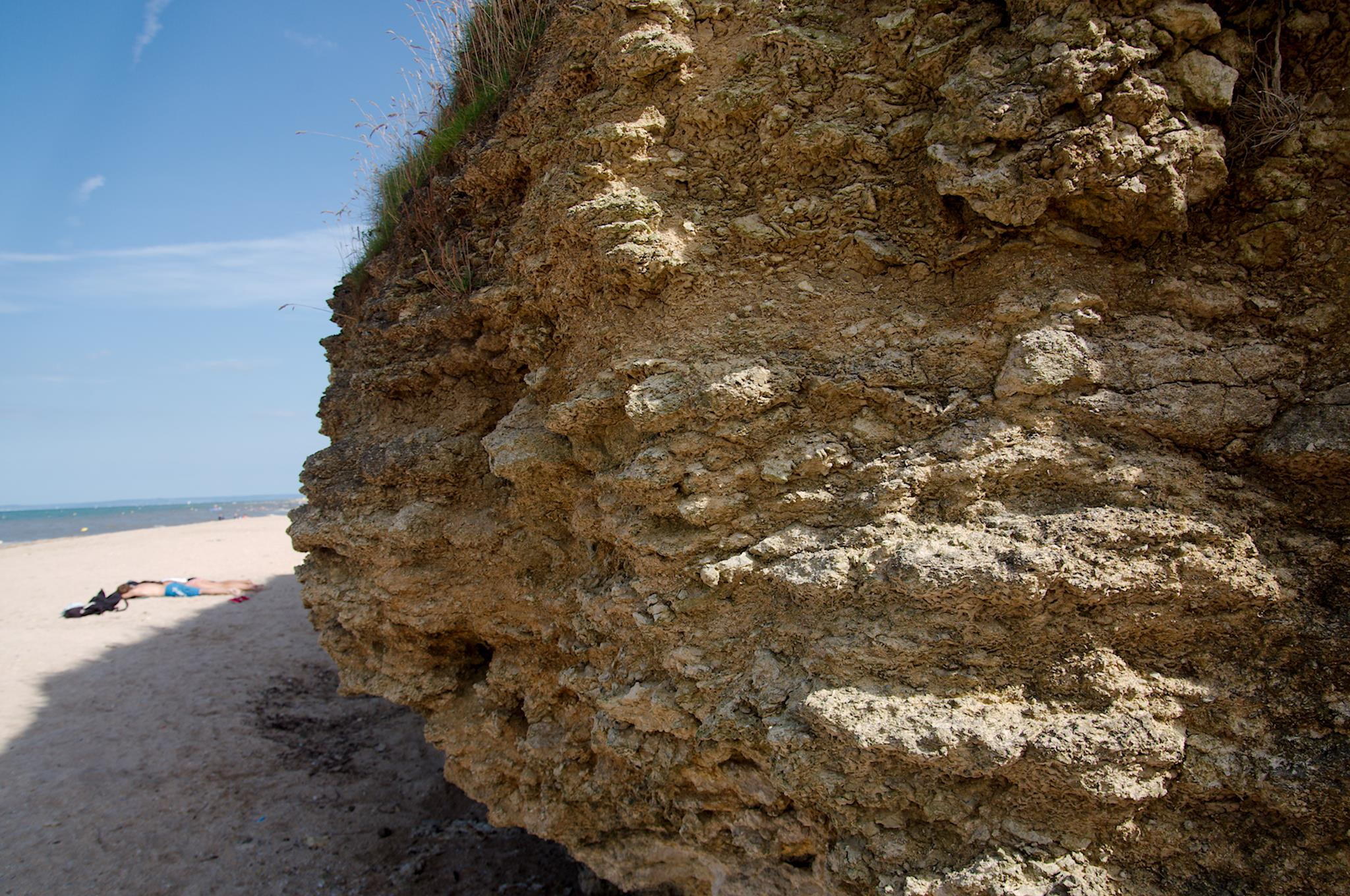 Détails des fossiles de la Falaise du Cap Romain à la réserve naturelle à Sait-Aubin-sur-Mer en France